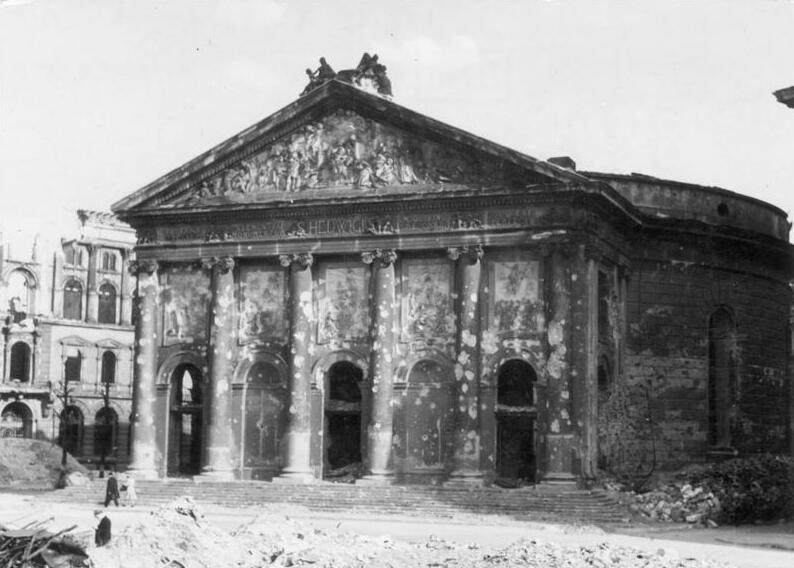 ADN-ZB/Herbst/Go/schm Berlin Die im II. Weltkrieg zerstörte St. Hedwig-Kathedrale am Bebelplatz. Auf. 1946 741-47